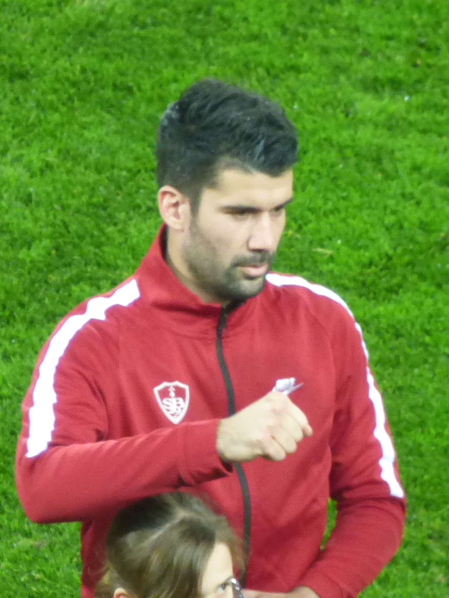 Quentin Bernard avant le match RC Lens / Stade brestois, le 4 décembre 2018, comptant pour la dix-septième journée du championnat de France de football de Ligue 2 2018-2019, au Stade Bollaert-Delelis.